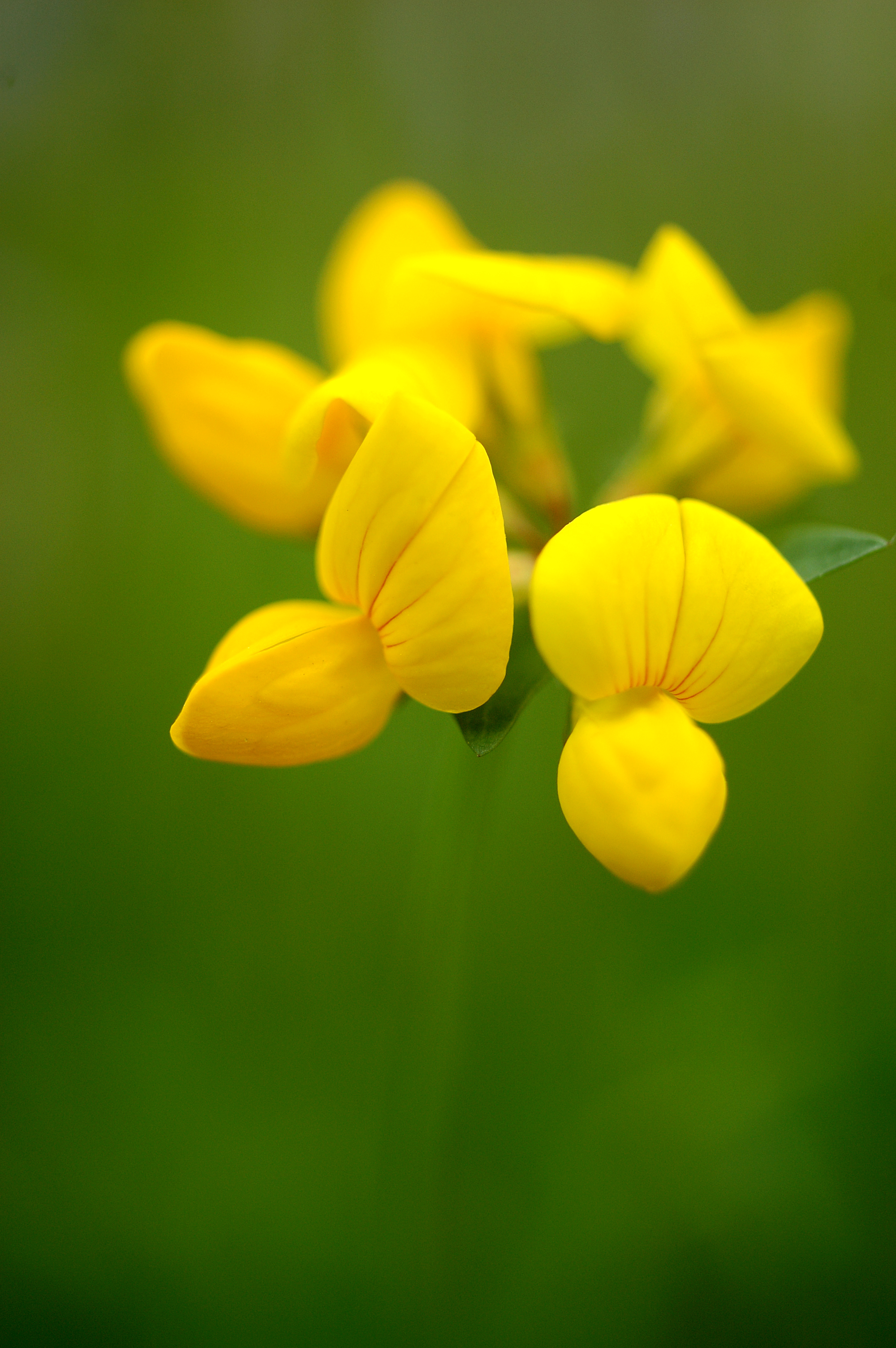 Blüten des Gewöhnlichen Hornklees (Lotus corniculatus)